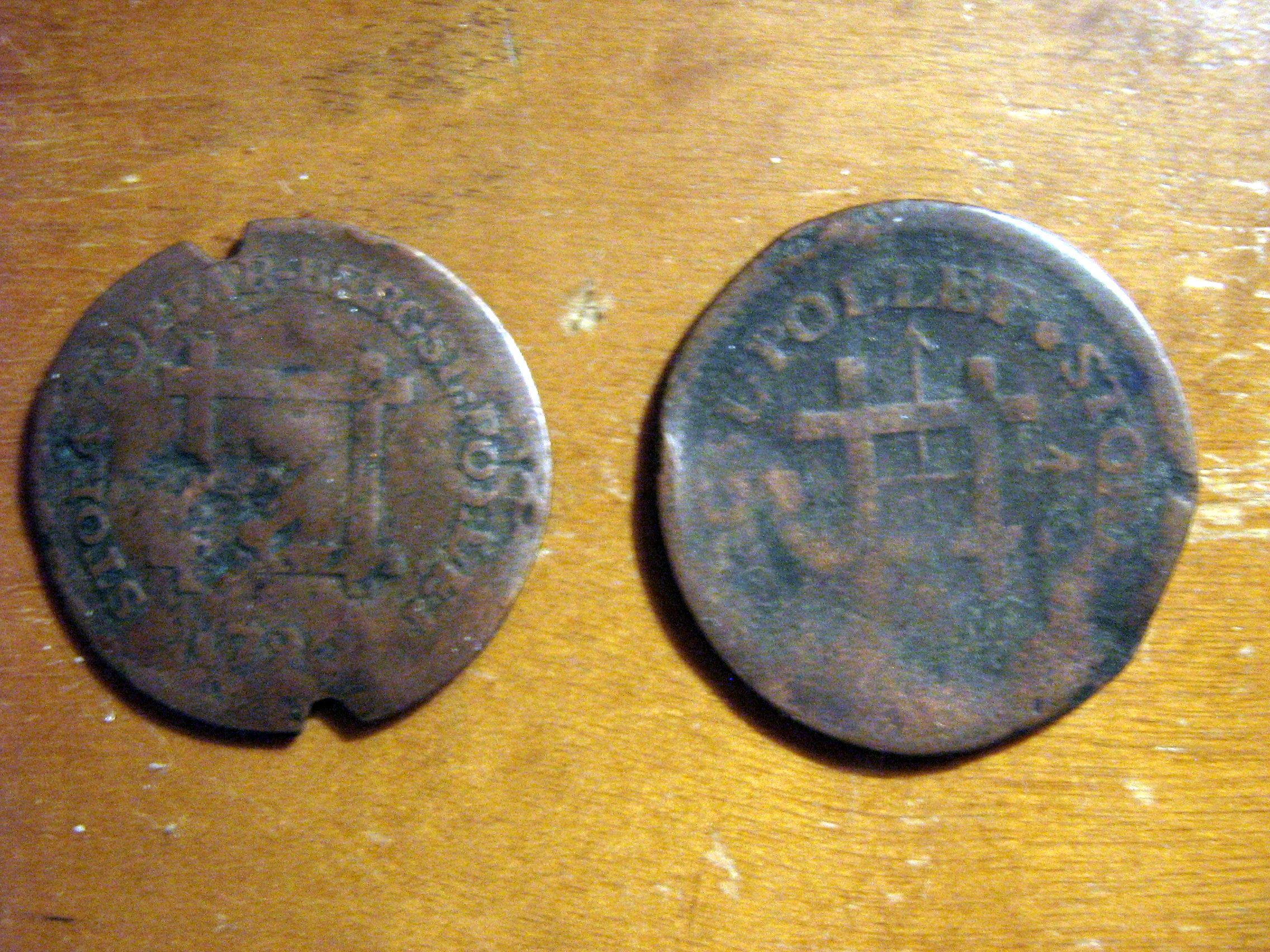 Kopparbergspolletter om 6 öre kopparmynt, 1790 och 1765.